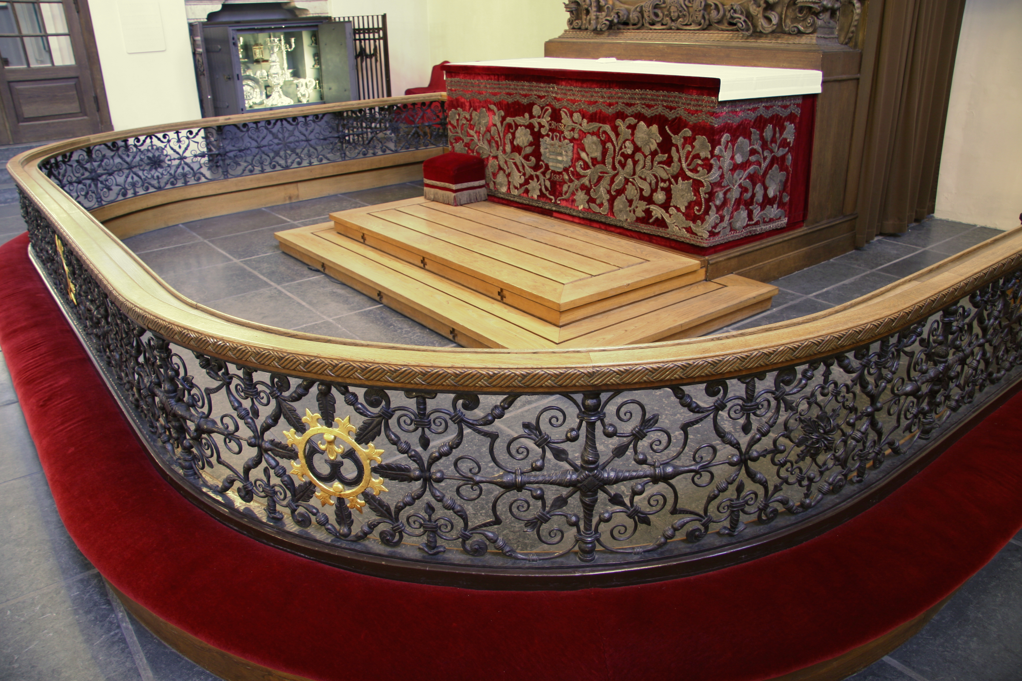 Holmens Kirke, Copenhagen, Denmark . Alterskranken.